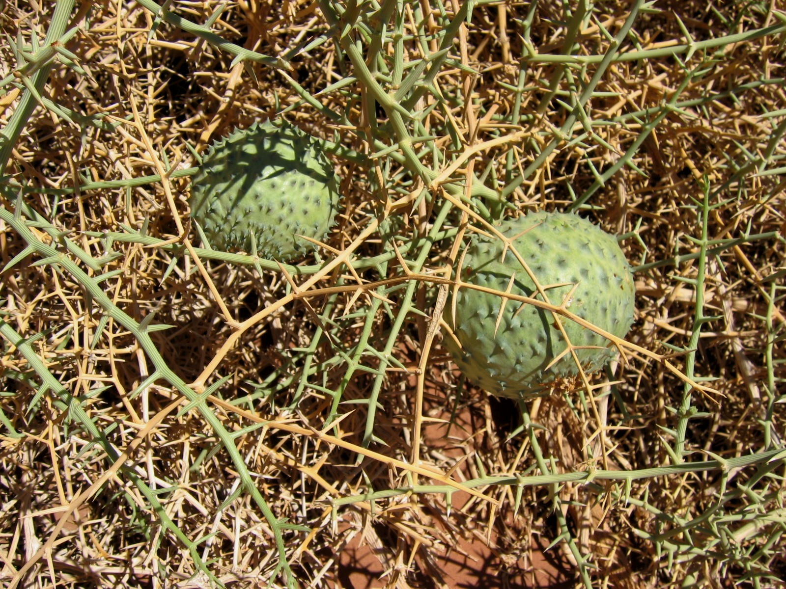 Nara Früchte; Butterpits Fruit; Sossusvlei; Namibia